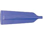 list pramickoveho padla